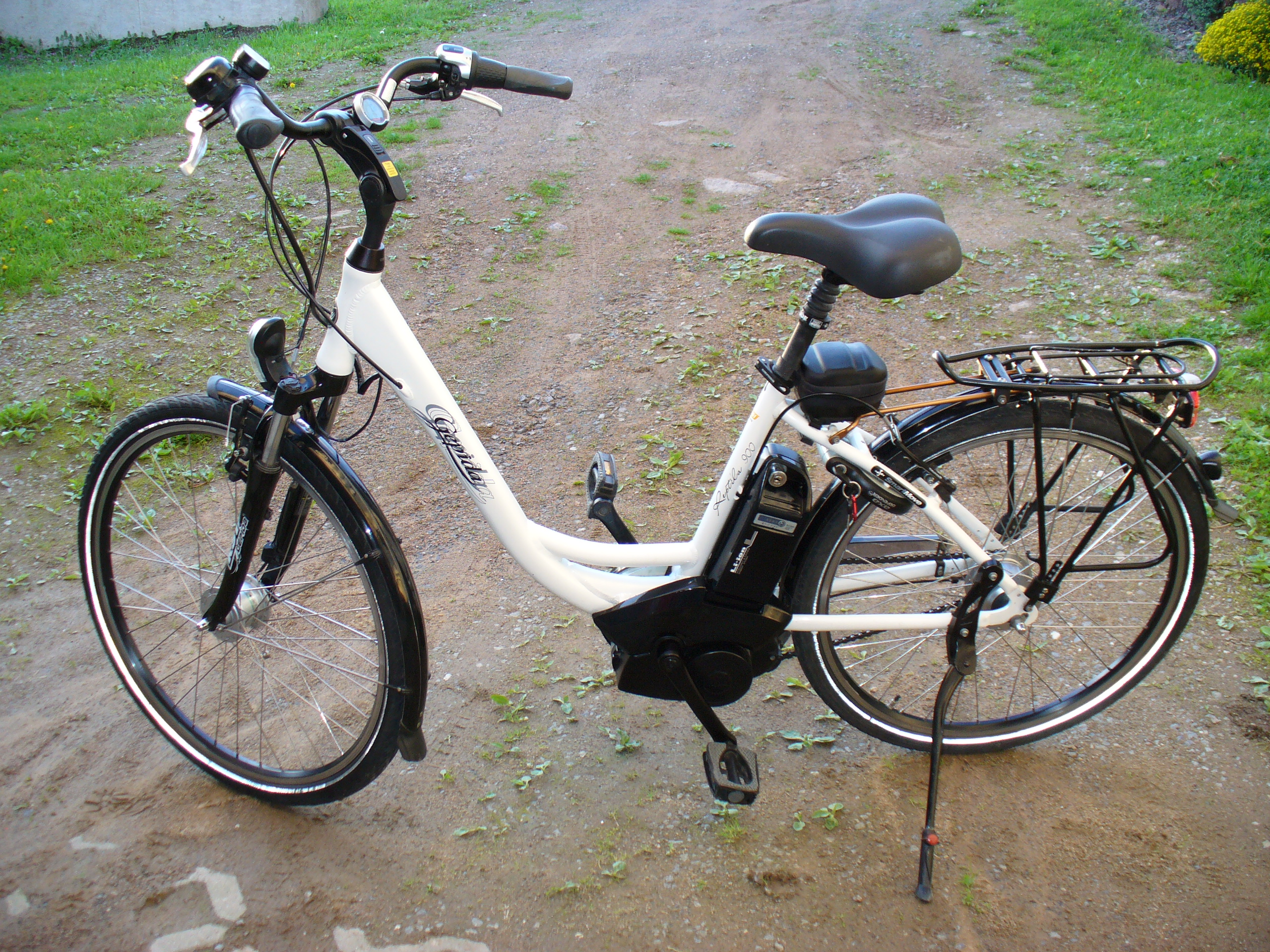 Gepida (Ungarn) Pedelec, Damenversion, Modell Reptila mit Yamaha Mittelmotor und Lion-Akku, 8-Gang-Shimano-Nabenschaltung, Shimano Nabendynamo im Vorderrad, Axa-Defender Rahmenschloss mit zusätzlicher Einsteckkette (in Satteltasche), Bj. etwa 2010